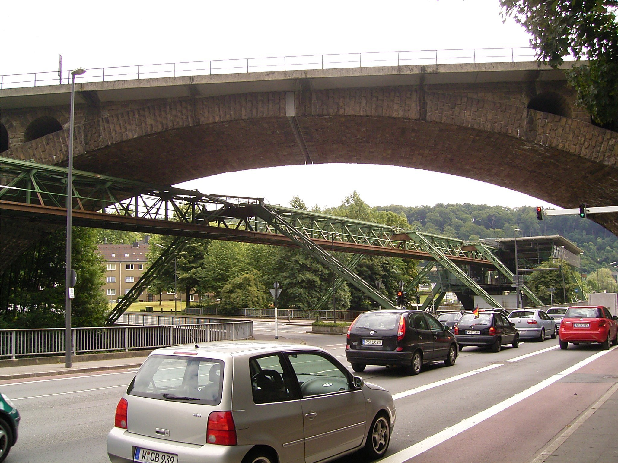 Sonnborner Eisenbahnbrücke, Wupperbrücke Siegfriedstraße und Schwebebahnstation Zoo/Stadion in Wuppertal